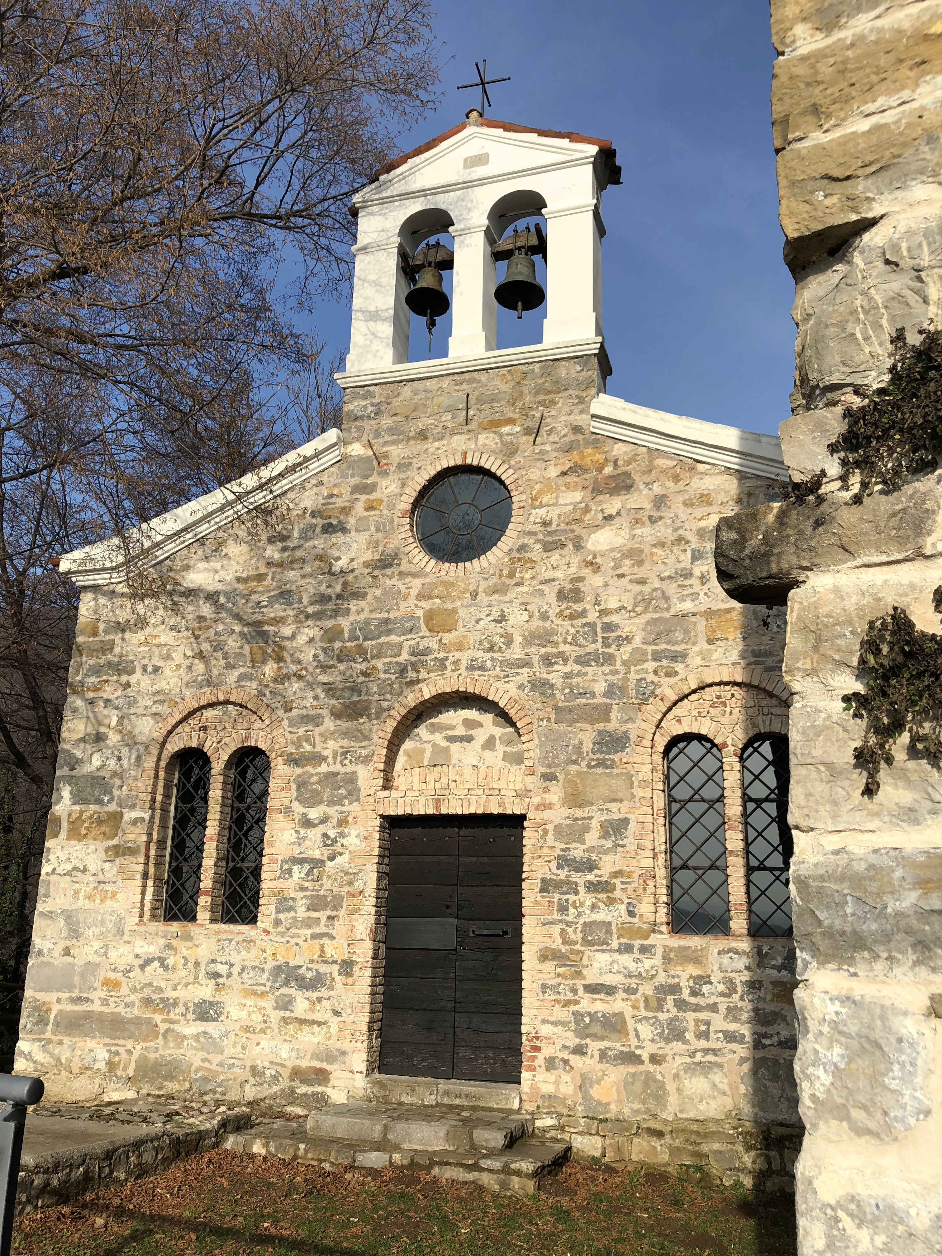 Castello Partistagno